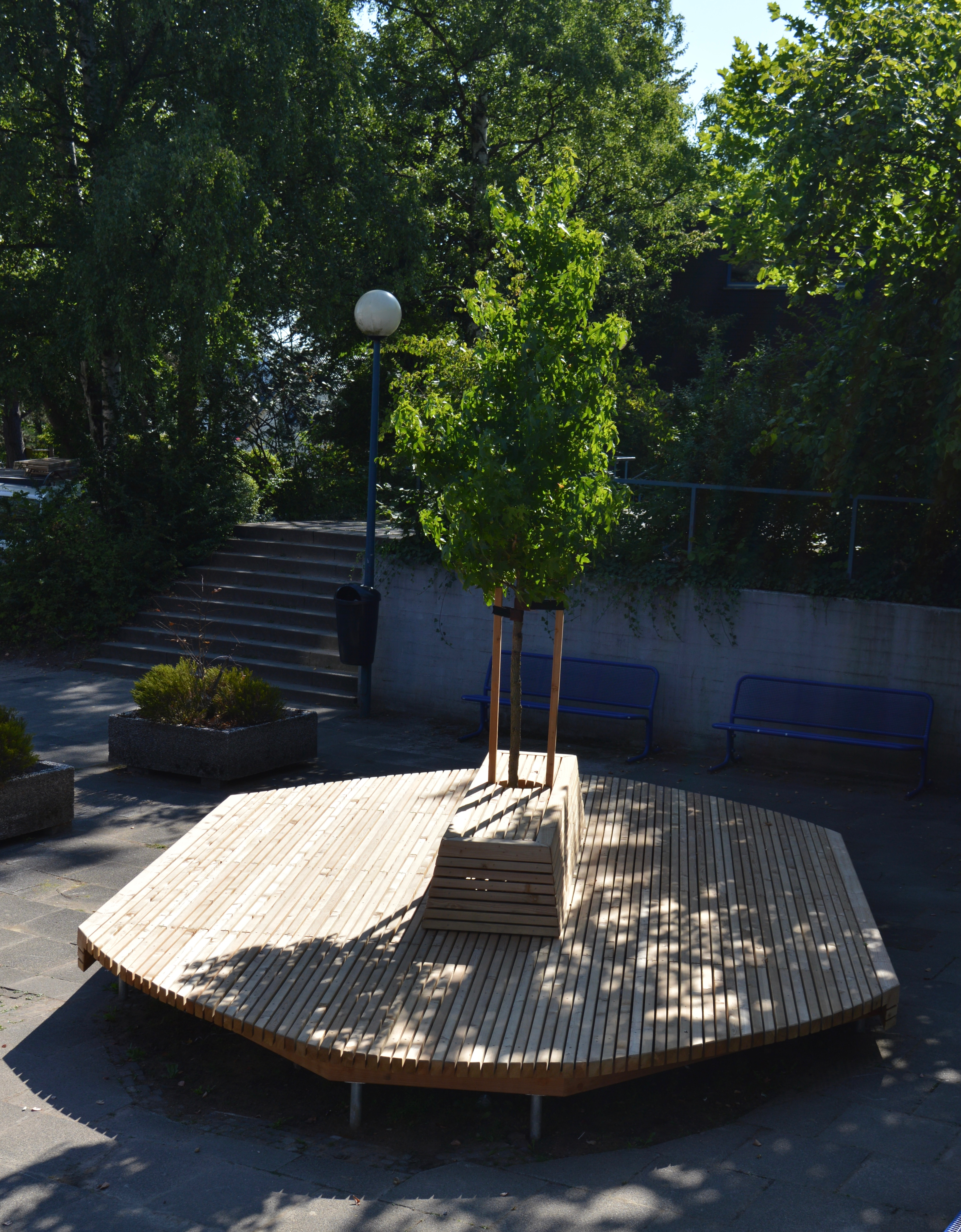 Das Bild zeigt eine Sonnenbank auf dem Pausenhof, die einen Amberbaum umschließt und sowohl für Gruppenarbeit als auch zur Erholung genutzt wird.